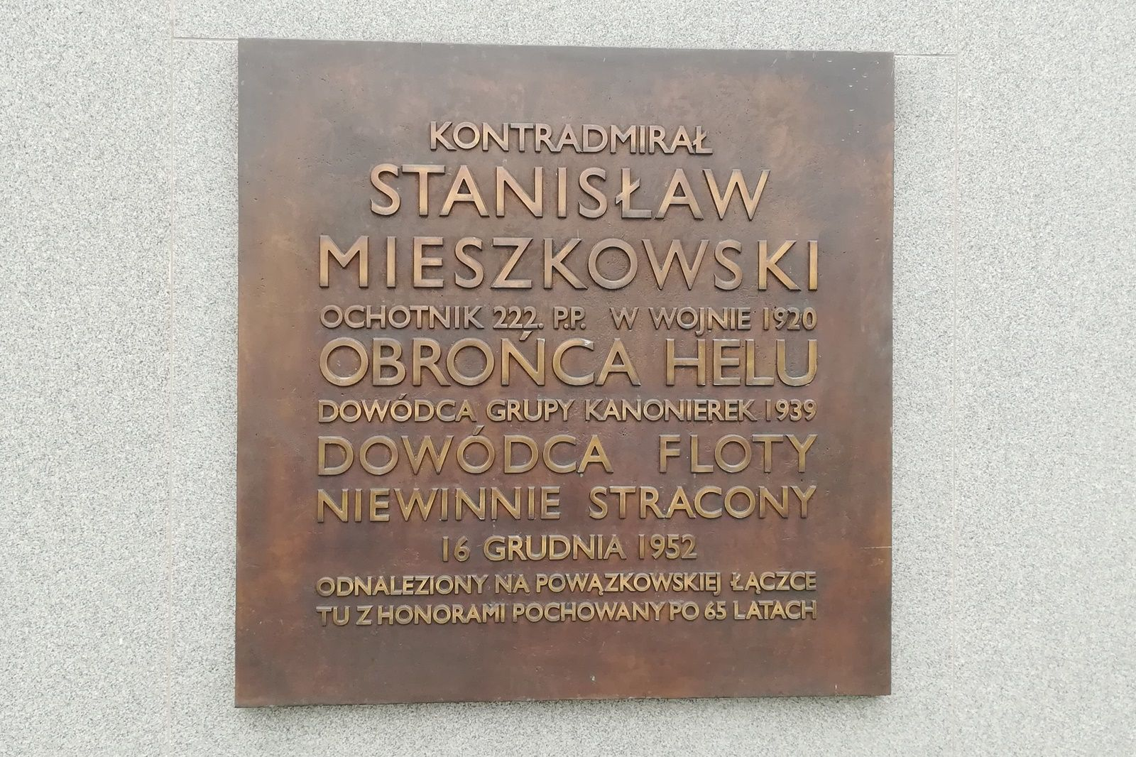 Cmentarz Marynarki Wojennej_Kwatera Pamięci_Kontradmirał Mieszkowski